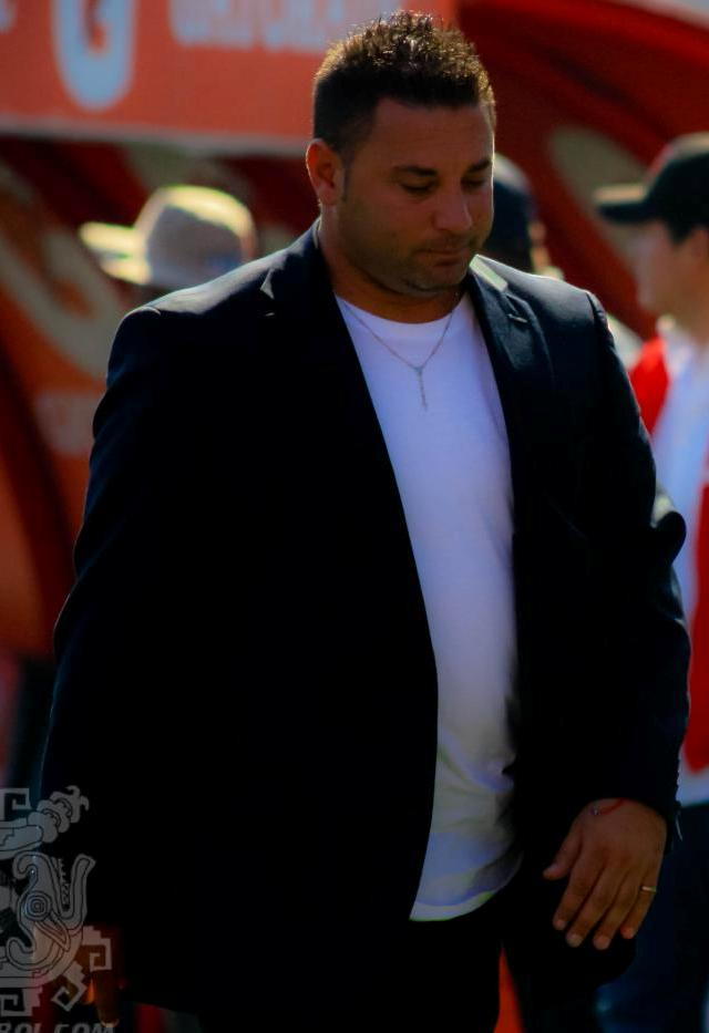 Xolos vs. San Luis para la jornada 16 del apertura 2011 del fútbol mexicano, partido celebrado en el estadio caliente de Tijuana.